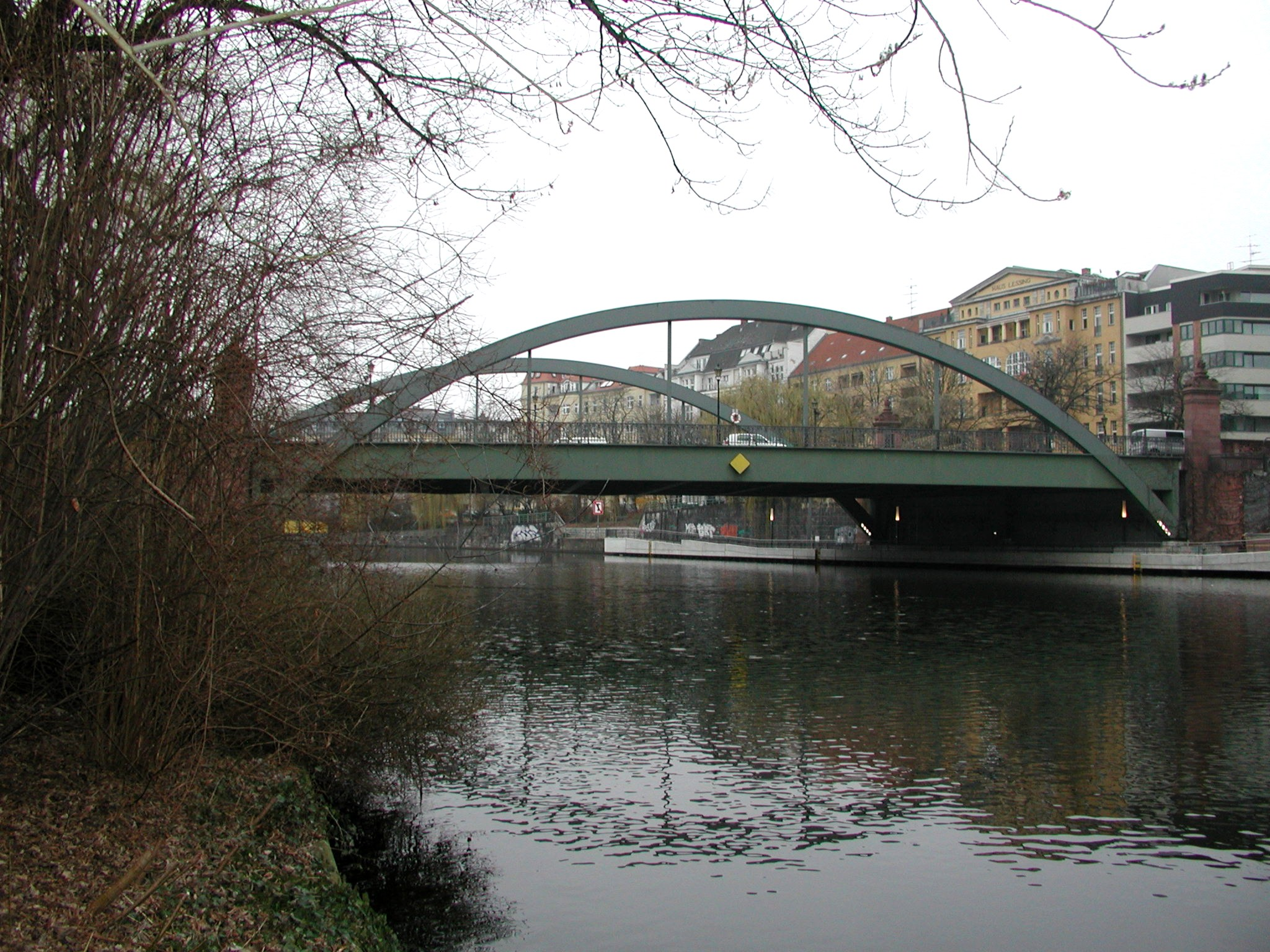 Lessingbrücke in Berlin, Ansicht von Osten